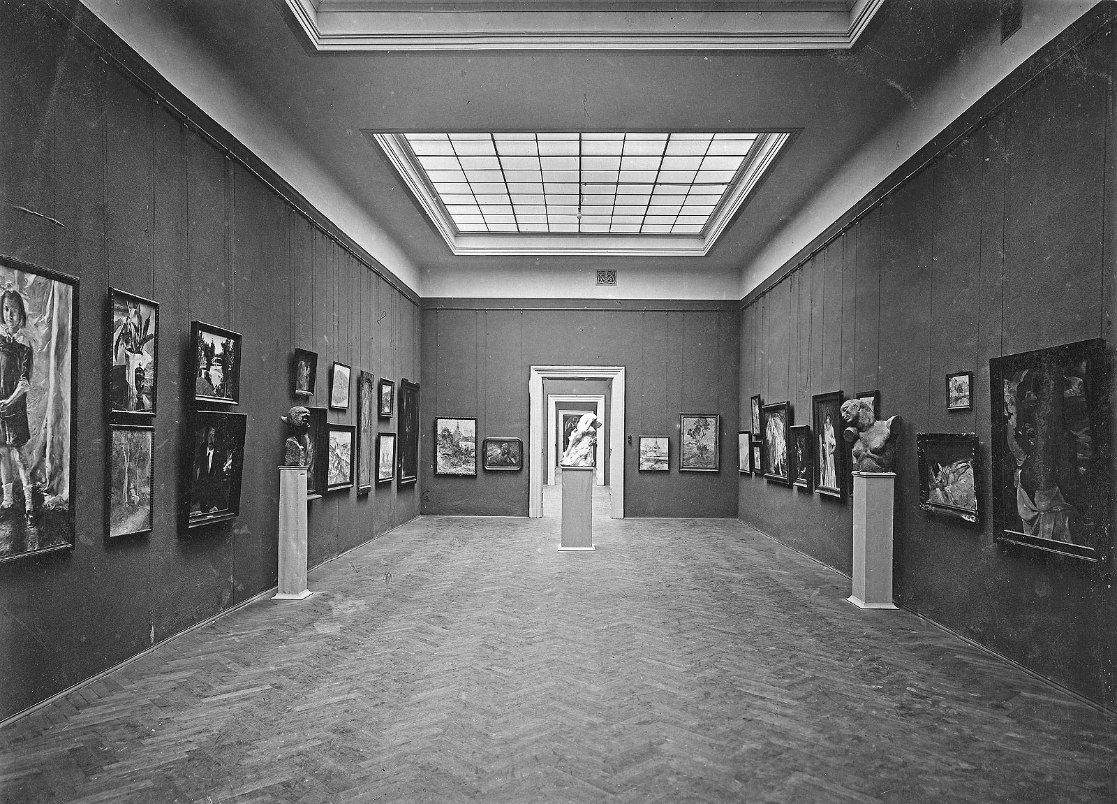 Stalna zbirka Narodne galerije.